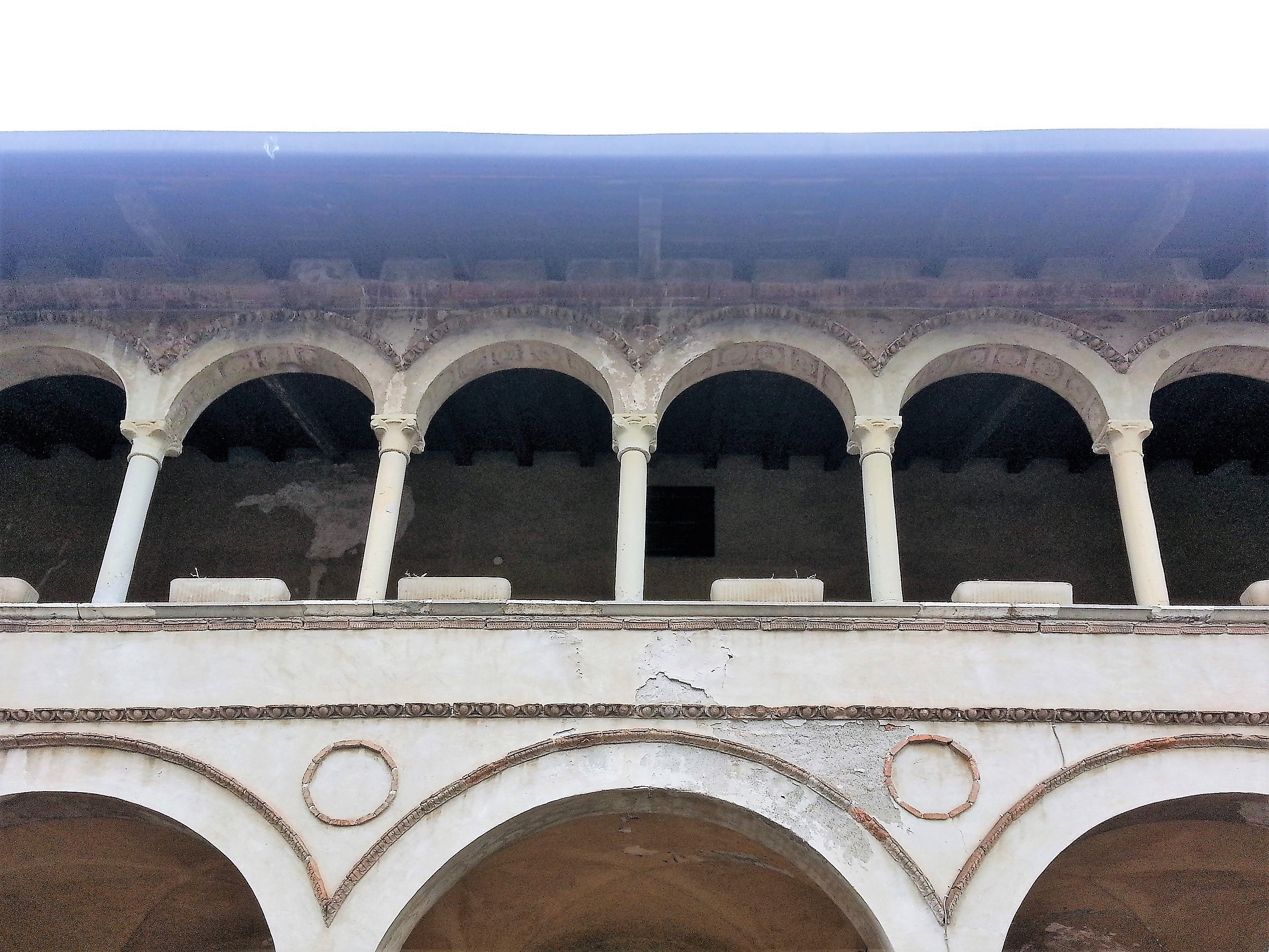 Loggiato superiore del chiostro del monastero di Santa Maria Assunta di Torre Boldone